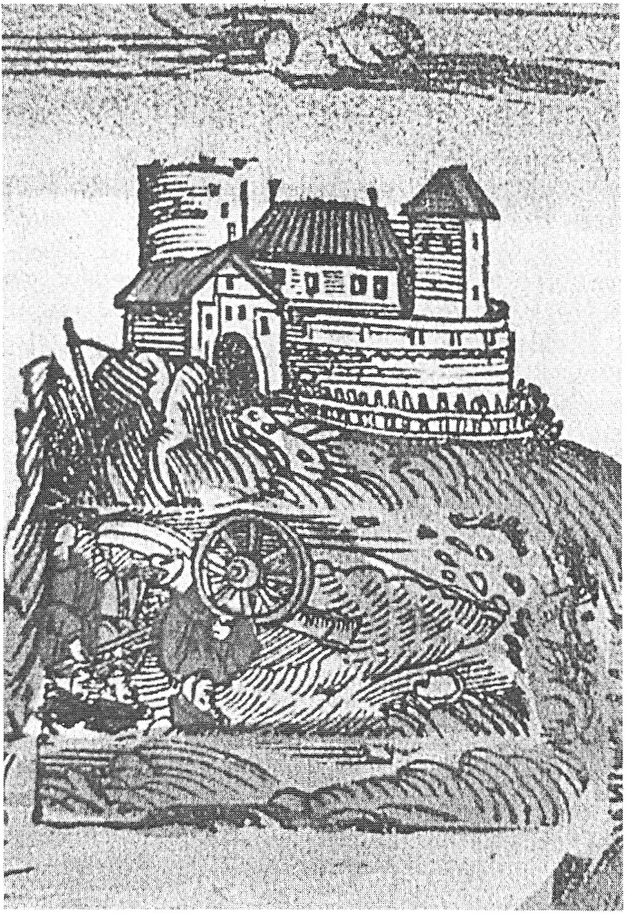 Kolorierter Holzschnitt (hier nur Schwarz-weiß) vom Schloss zu Strössendorf während des Bauernkrieges von 1525